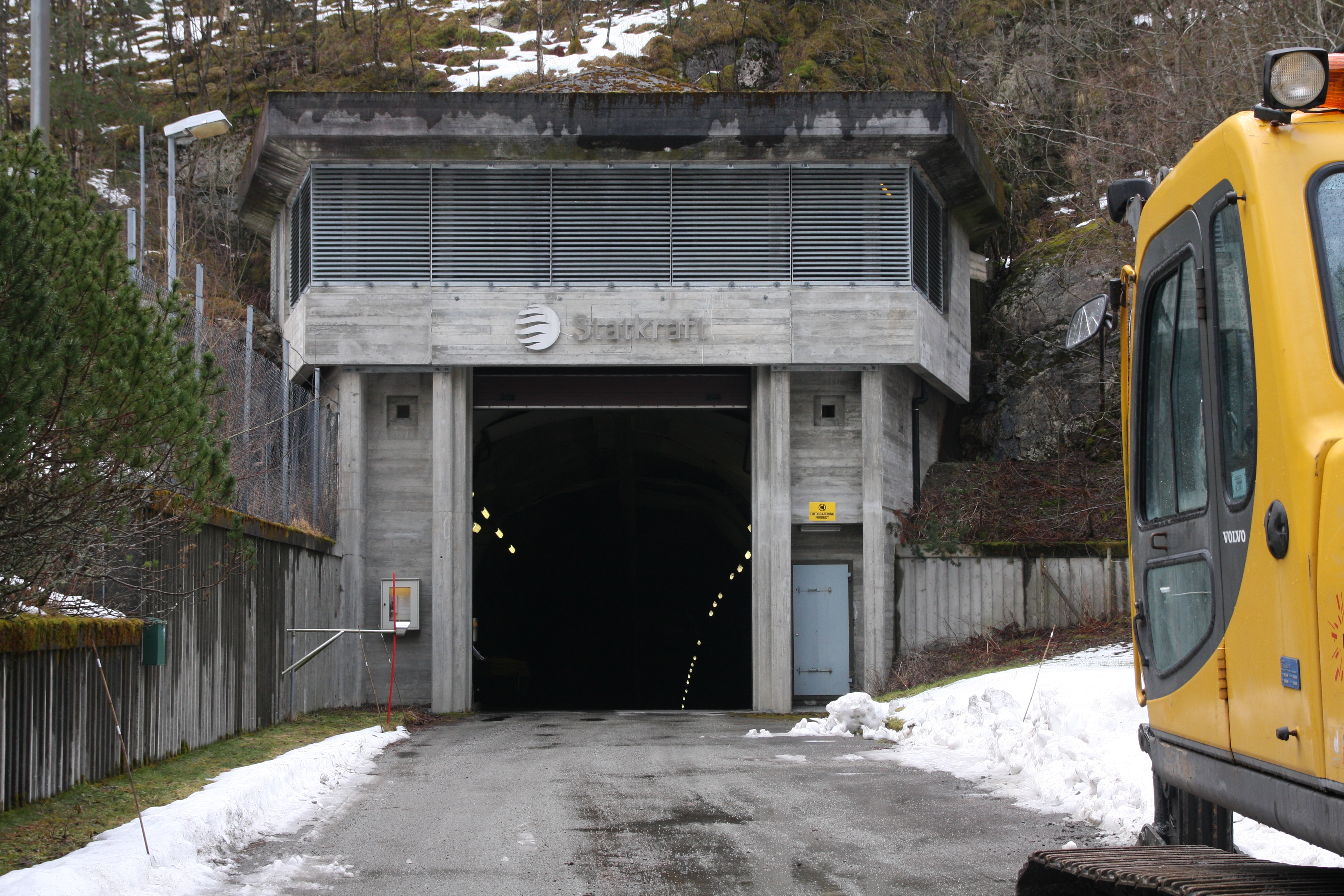 Kvilldal Kraftverk